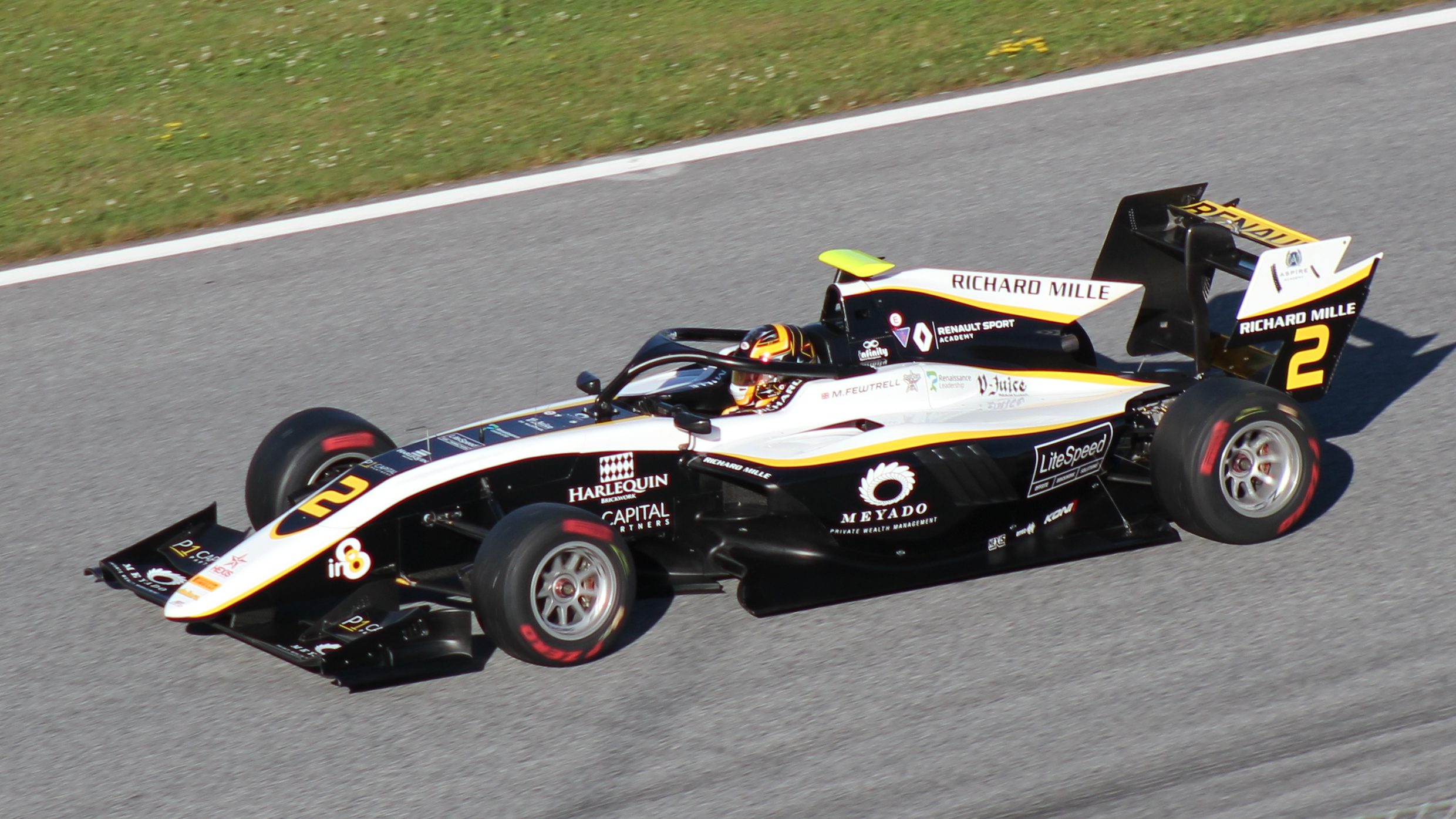 Fewtrell beim Rennwochenende in Österreich 2019